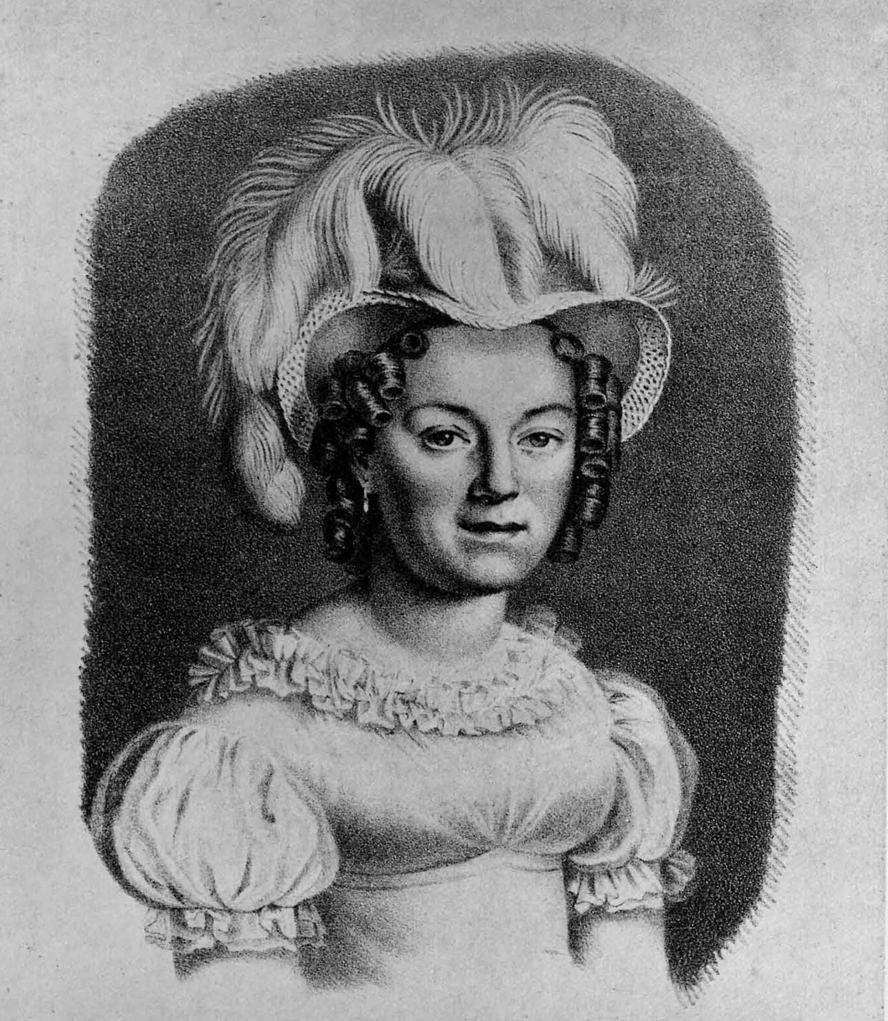 Мария Ивановна Вальберхова (1789—1867) — русская актриса.